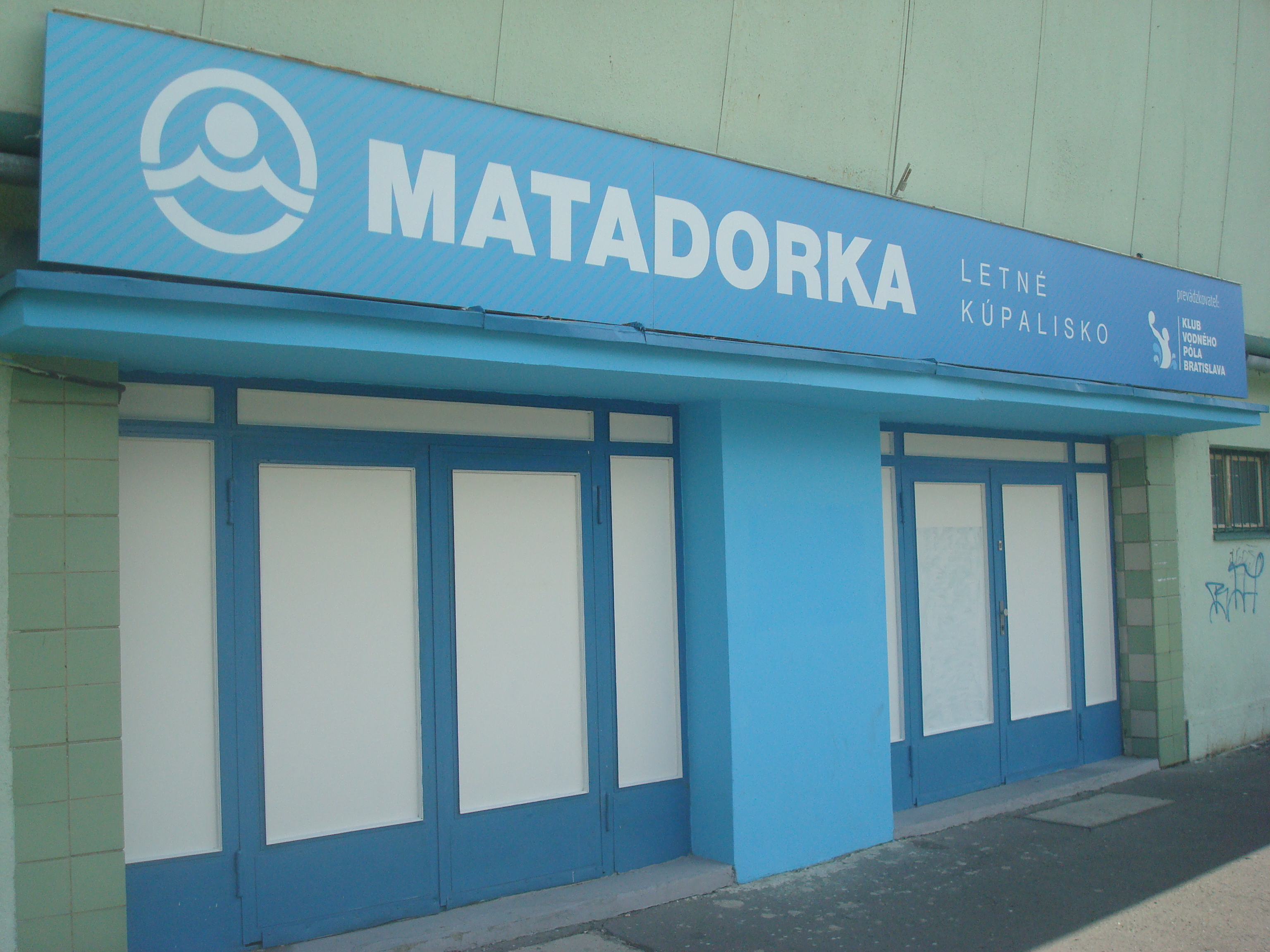 Matadorka Swimming Pool, Petržalka, Bratislava